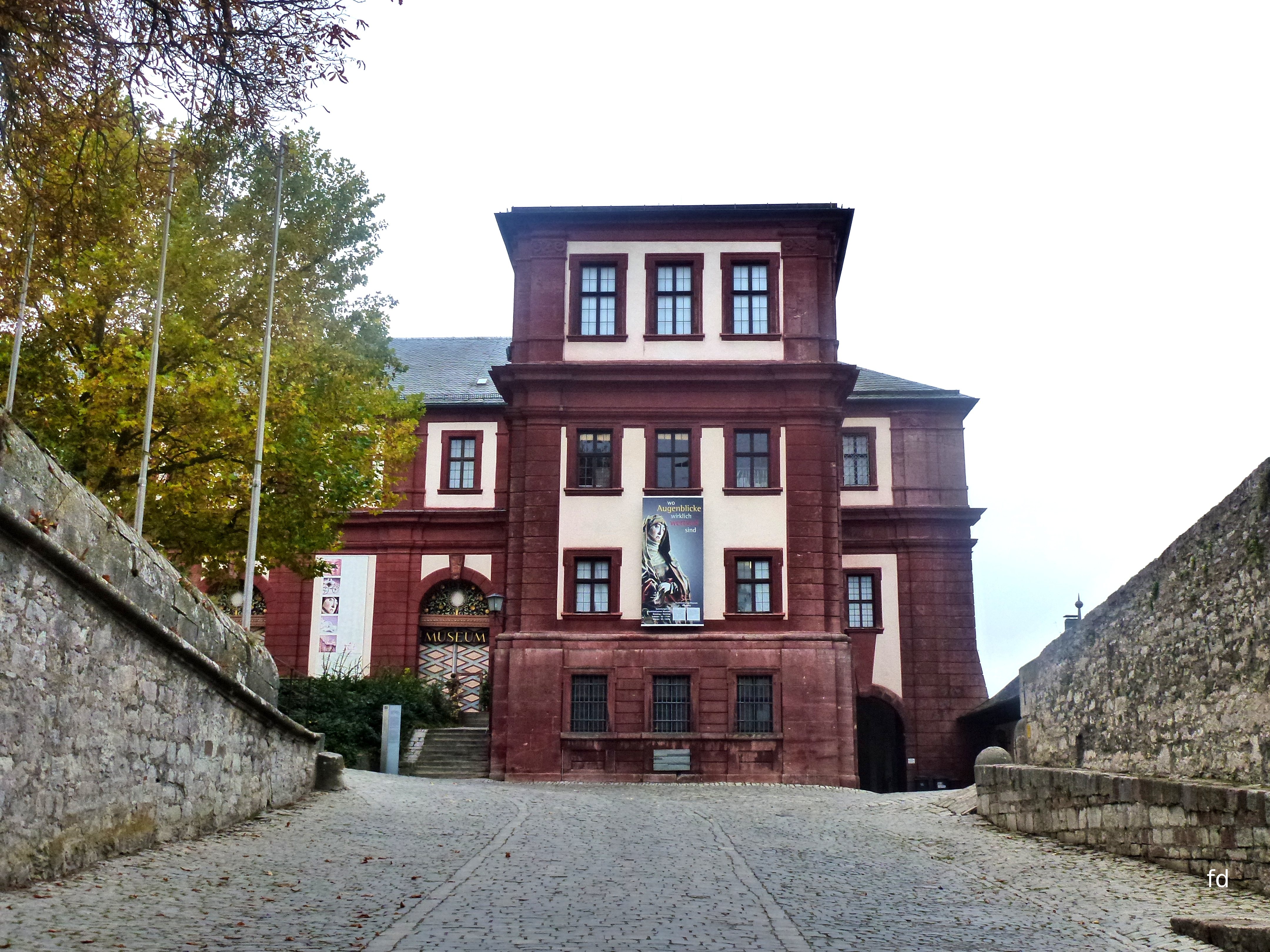 Festung Marienberg AufgangsbereichThis is a photograph of an architectural monument.